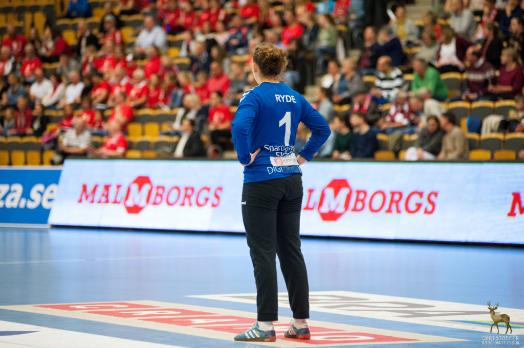 Jessica Ryde, målvakt i H65 Höör